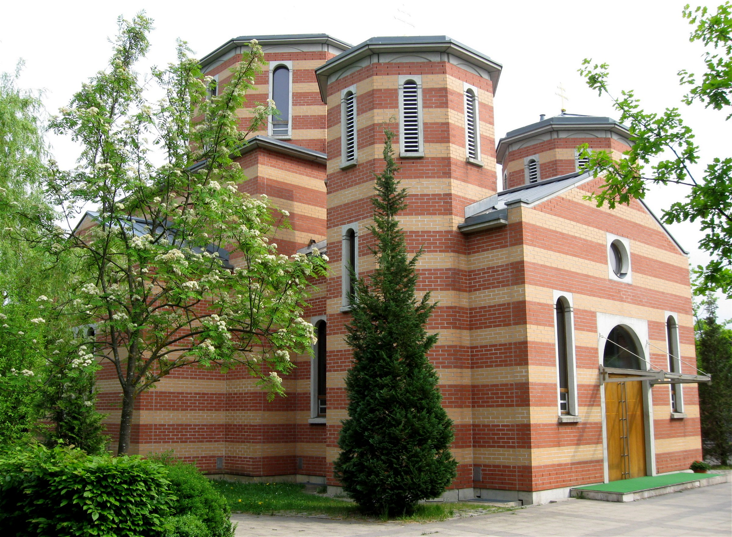 Serbisch-Orthodoxe Kirchengemeinde in München-Perlach